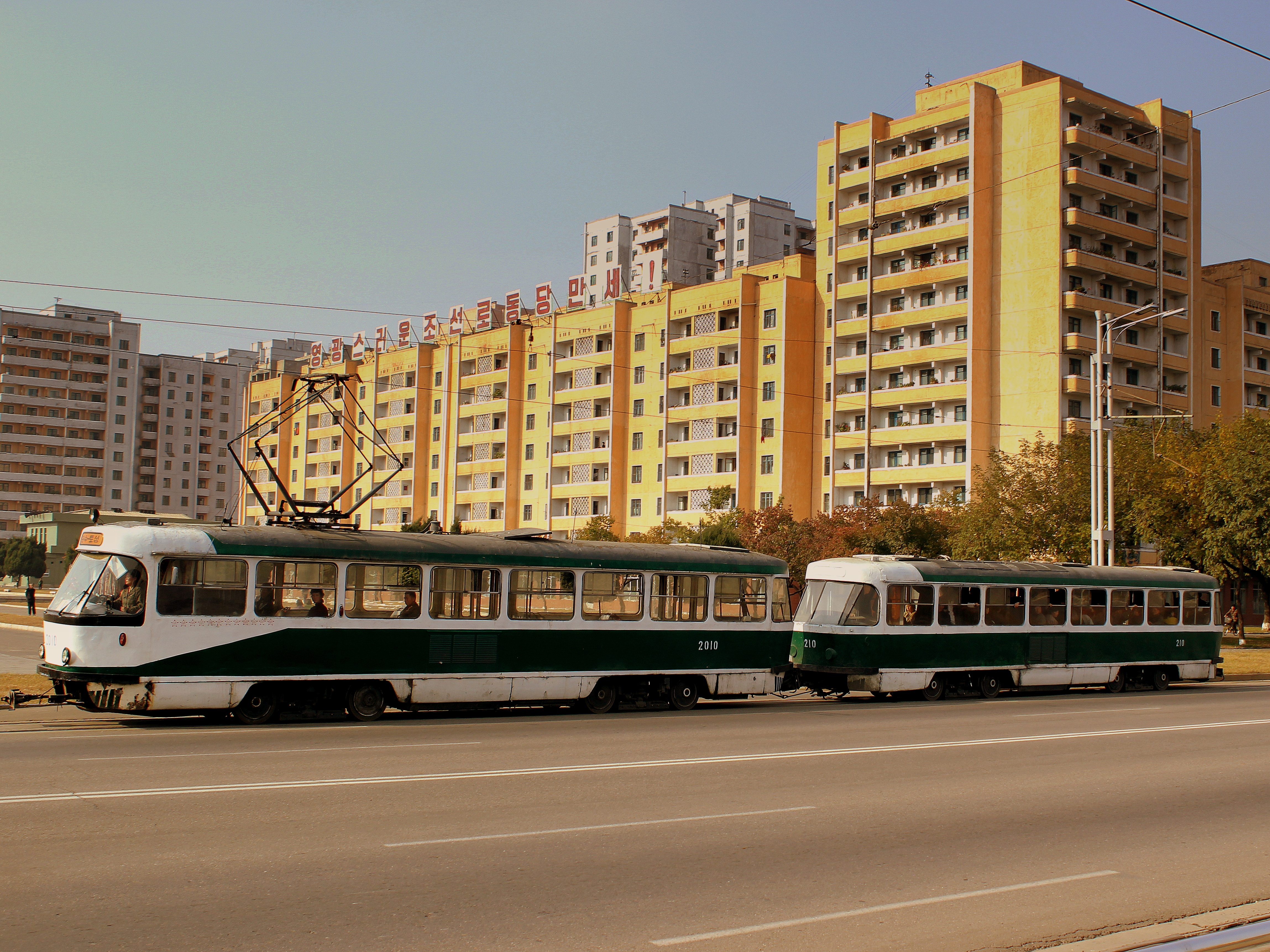 Tatra tram in Pyongyang, October 2012